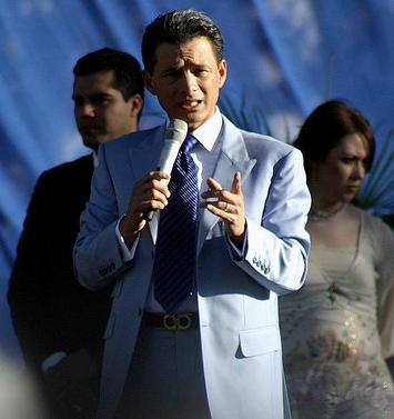 El pastor evangélico guatemalteco y fundador del Ministerio Casa de Dios: Cash Luna